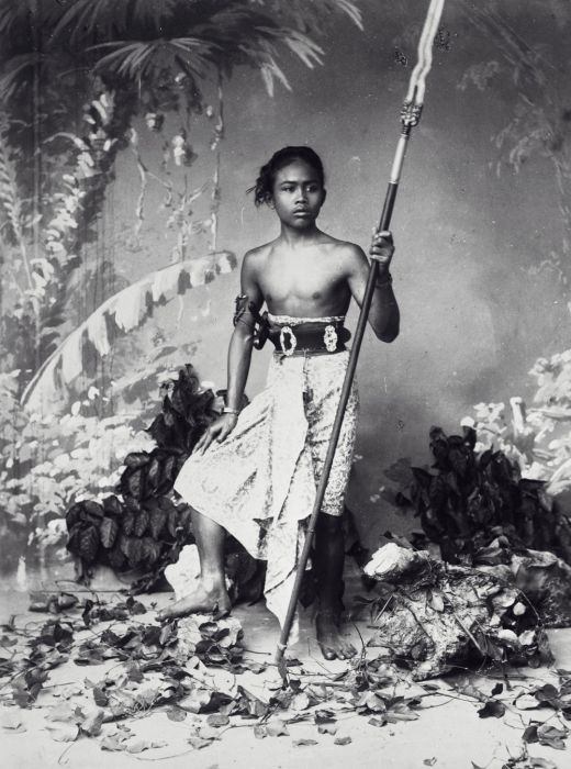 Foto. Studioportret van een "krijgsman uit Djokja"